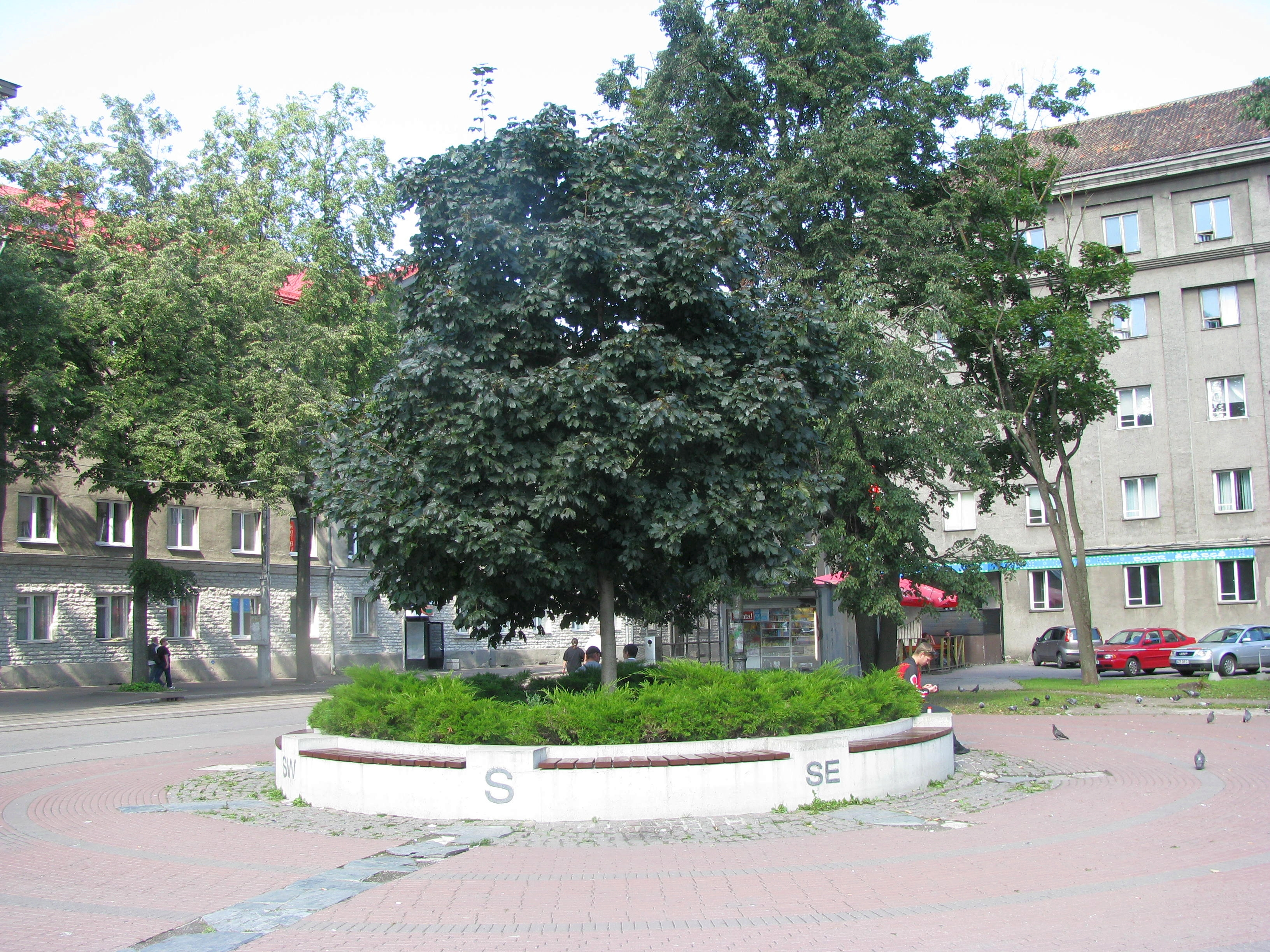 Ilmakaarte märgistus Tallinnas Kompassi platsil.